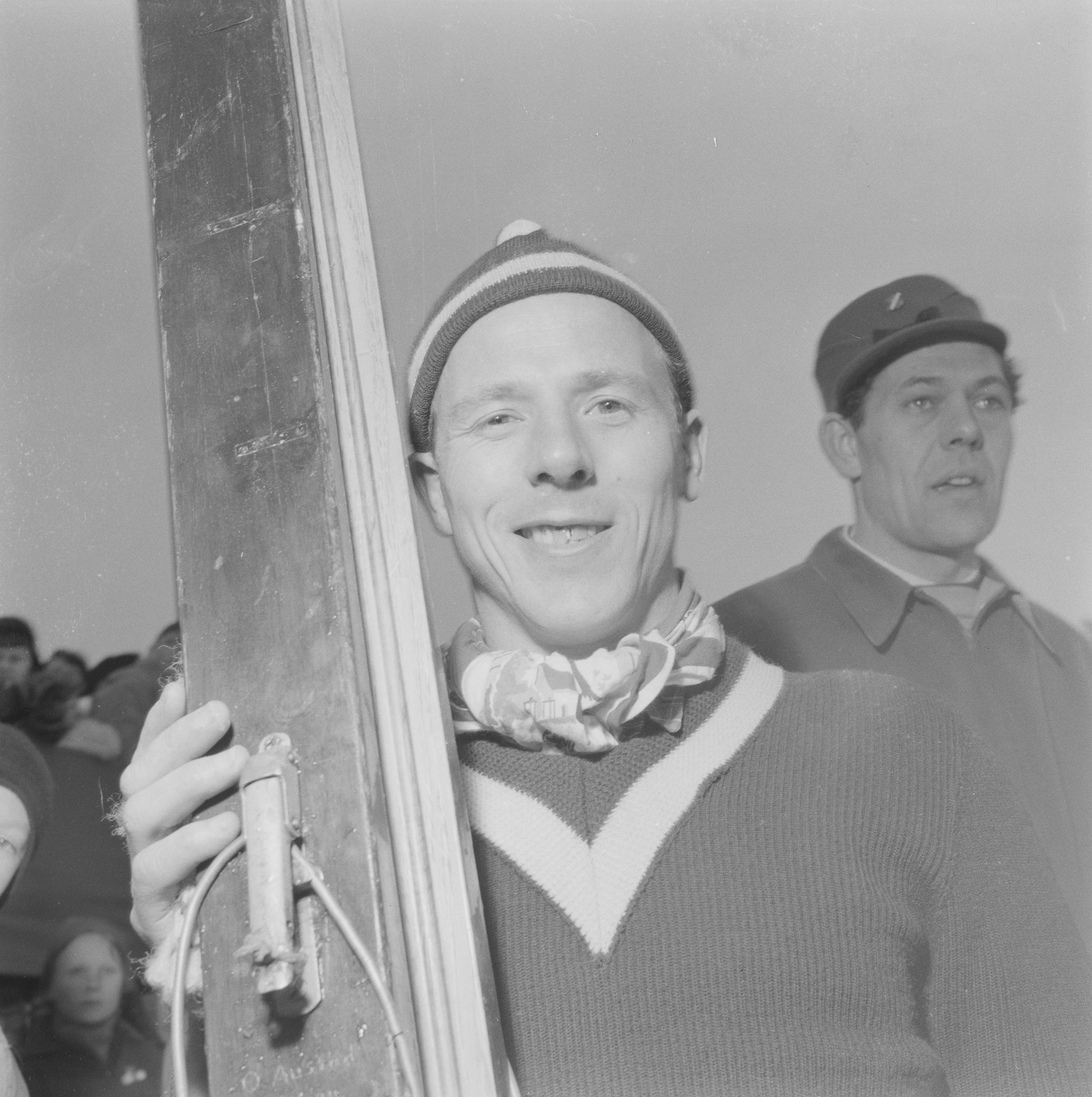 Bildet er hentet fra Arkivverket. Holmenkollen 1953. Otto Austad, vinneren av spesialhopprennet i Holmenkollen i 1953. NÅ nr. 5, 1953 Arkivinstitusjon : Riksarkivet Arkivnavn : Billedbladet NÅ Sted : Norge, Oslo, Oslo, Holmenkollen Emneord: Hopprenn, Hopp, Skihopp, Vintersport, Ski, Holmenkollen, Skihoppere Avbildet: Austad, Otto